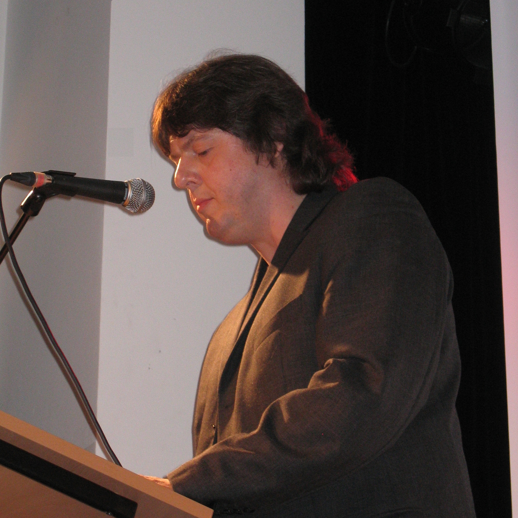 Der Musiker Bernd Kistenmacher liest eine Laudatio bei der „Schallwelle“-Preisverleihung in Dinslaken vor. März 2009